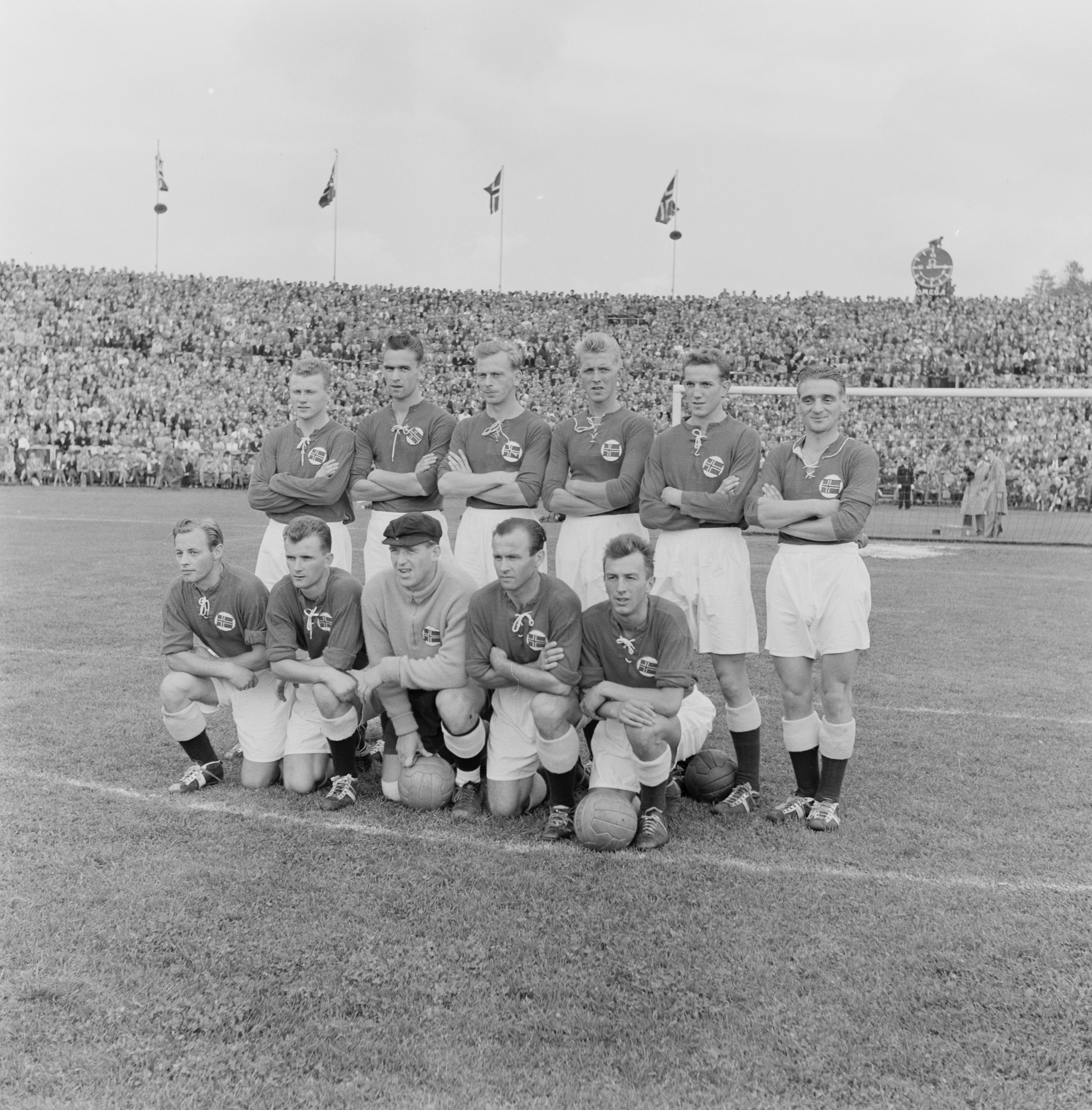 Bildet er hentet fra Arkivverket. Landskamp Norge-Danmark, Ullevål Arkivinstitusjon : Riksarkivet Arkivnavn : Billedbladet NÅ Sted : Norge, Oslo, Oslo, Ullevål stadion Emneord: Fotball, Menn, Landslag Avbildet: Bak fra venstre: Per Knudsen, Arne Kotte, Thor Hernes, Gunnar Dybwad, Finn Gundersen, Harry Kure. Foran fra venstre Thorleif Olsen, Arne Bakker, Asbjørn Hansen, Harry Boye Karlsen, Arne Legernes.